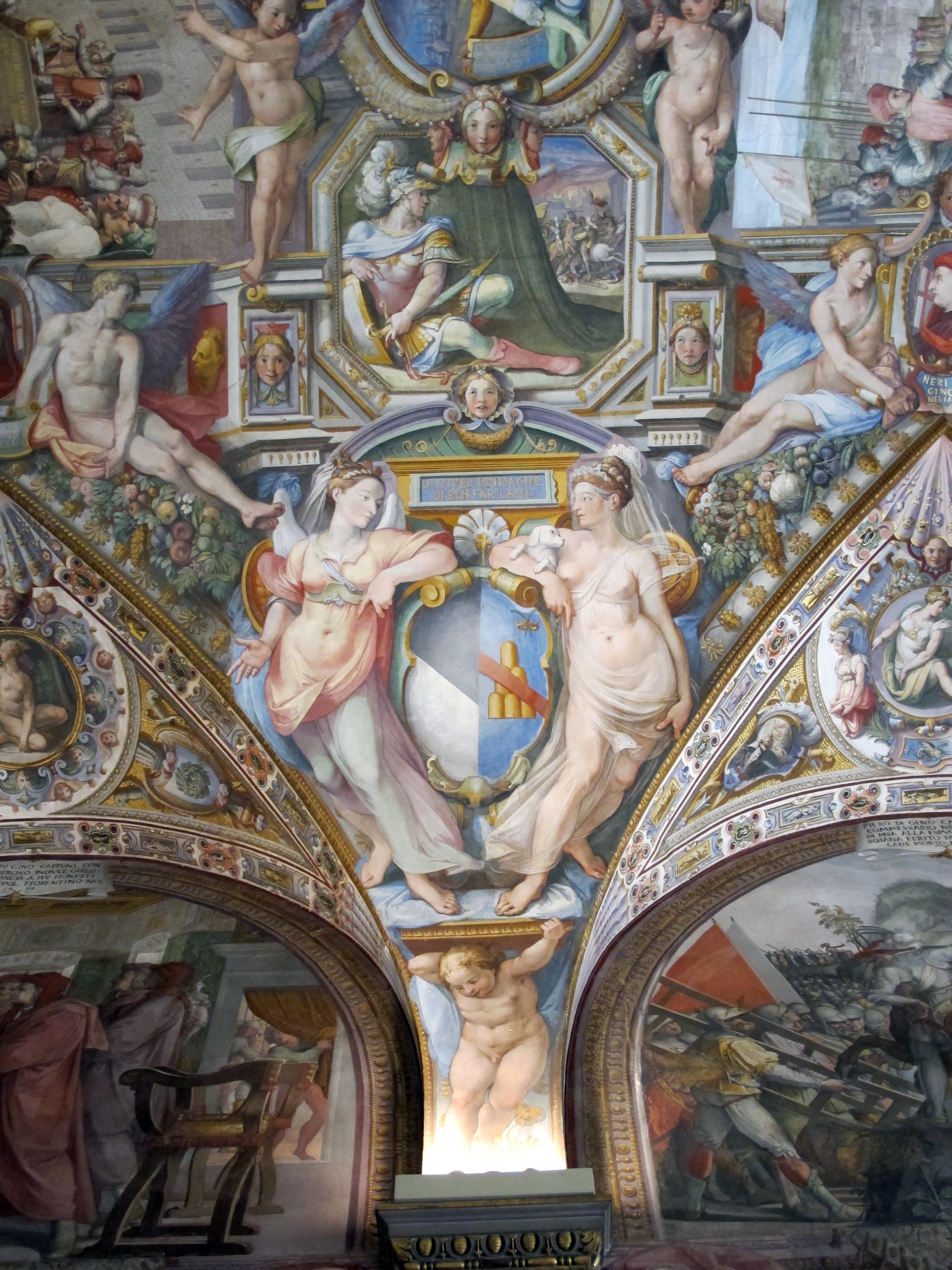 Palazzo capponi-vettori, salone poccetti, pennacchio con stemma caponi ridolfi